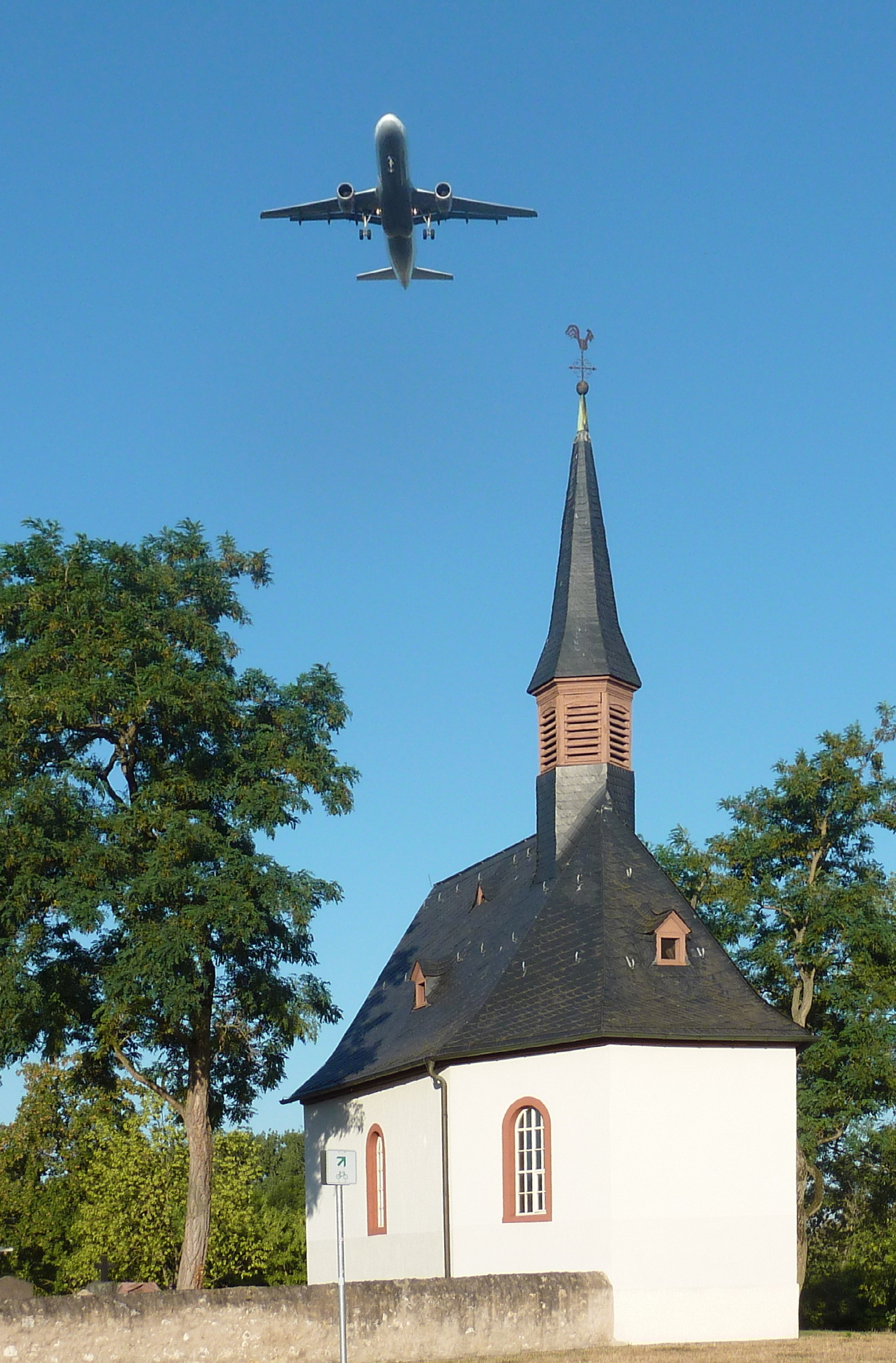 Die Mönchhofkapelle ist ein barocker Kirchenbau auf der Gemarkung der hessischen Gemeinde Raunheim im Kreis Groß-Gerau. Das auf das 17. Jahrhundert zurückgehende Gebäude mit Kirchhof steht am orographisch linken, dort südlichen Mainufer. Unmittelbar über das Grundstück hinweg führt die Einflugschneise der Landebahn Nordwest des benachbarten Frankfurter Flughafens. Im Bild die Kapelle mit zweistrahliger Maschine im Landeanflug, Blick nach Westen